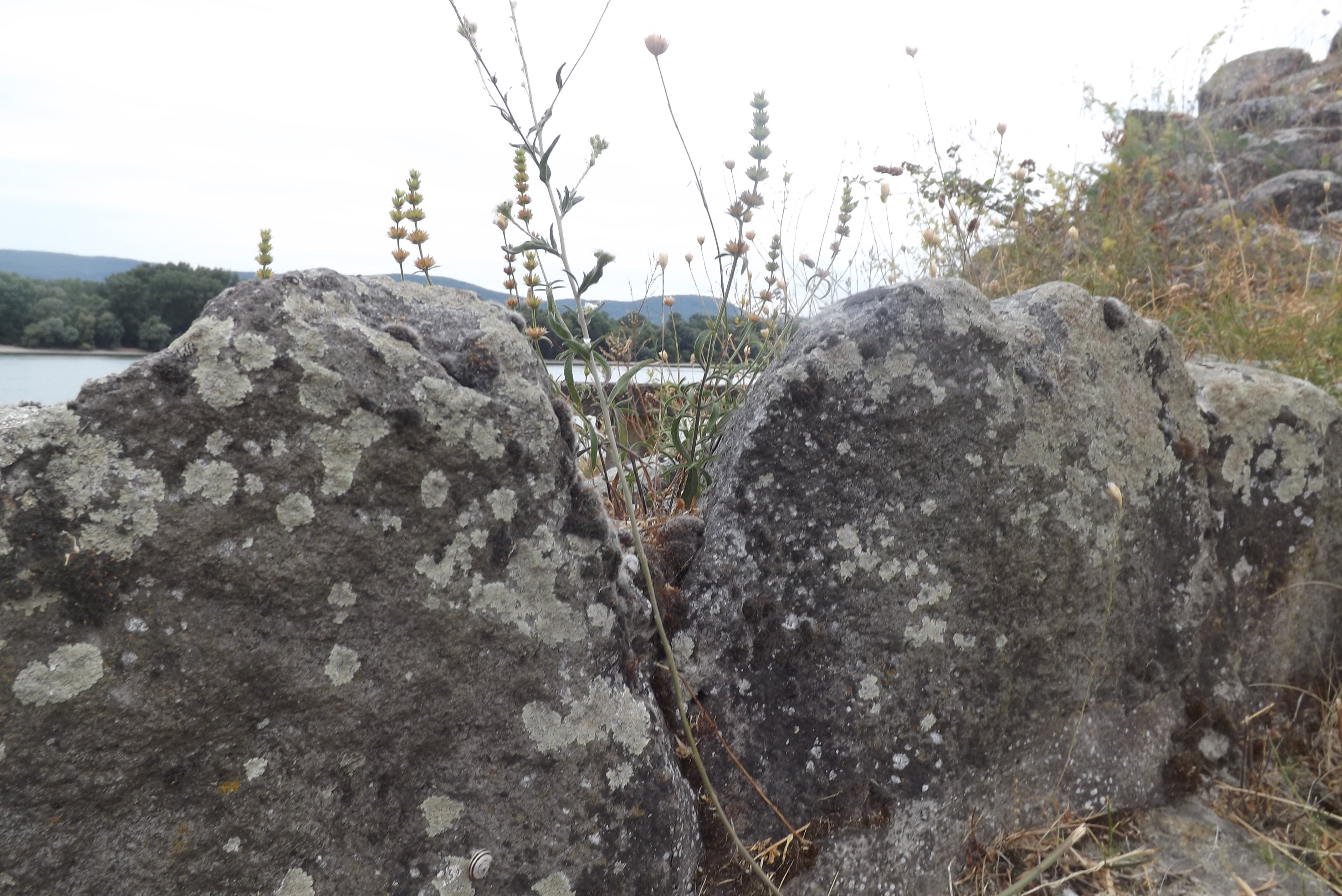 Római erőd romjai a Dunaparton, Verőce